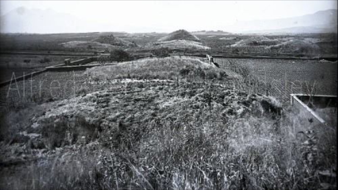 Kaminal Juyu maya site in the 1890s.